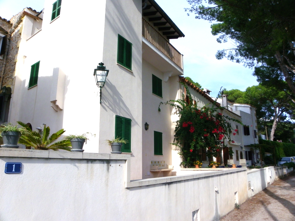 Núcleo de la colonia de veraneo proyectada por Nicolau Rubió i Tudurí